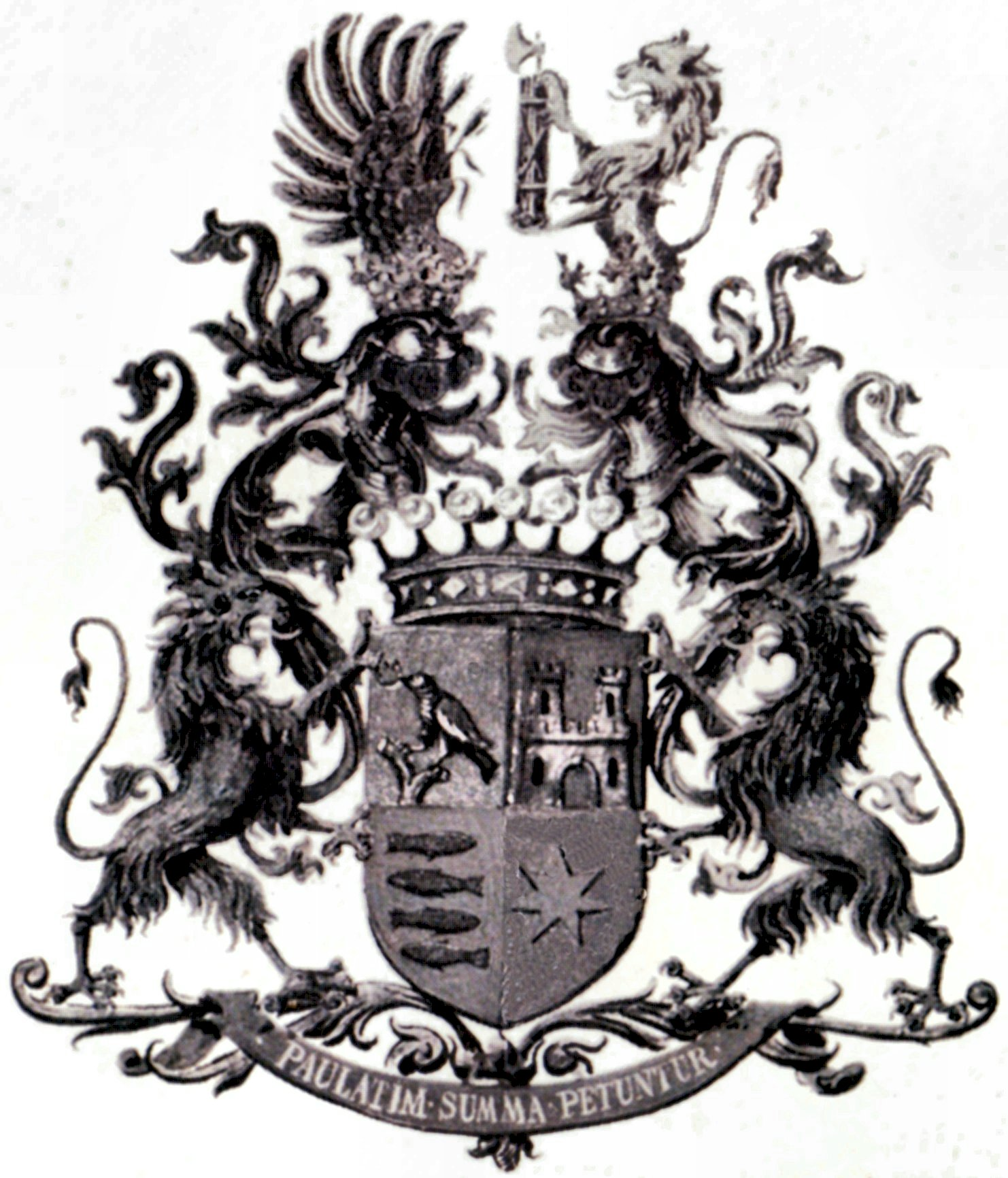 Wappen Kochanowski von Stawczan (Freiherren) 1898